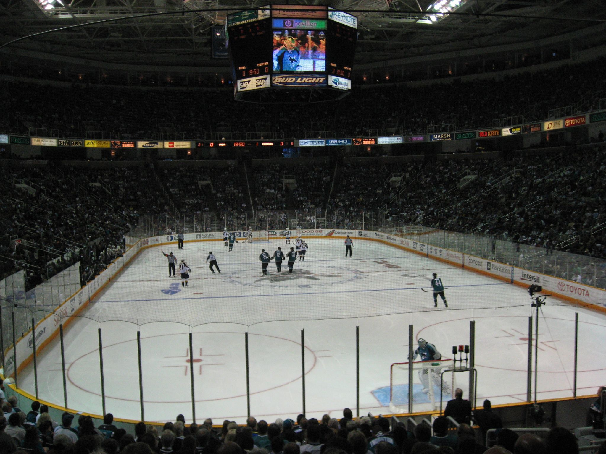 Hp Pavilion de San jose auteur : e.t